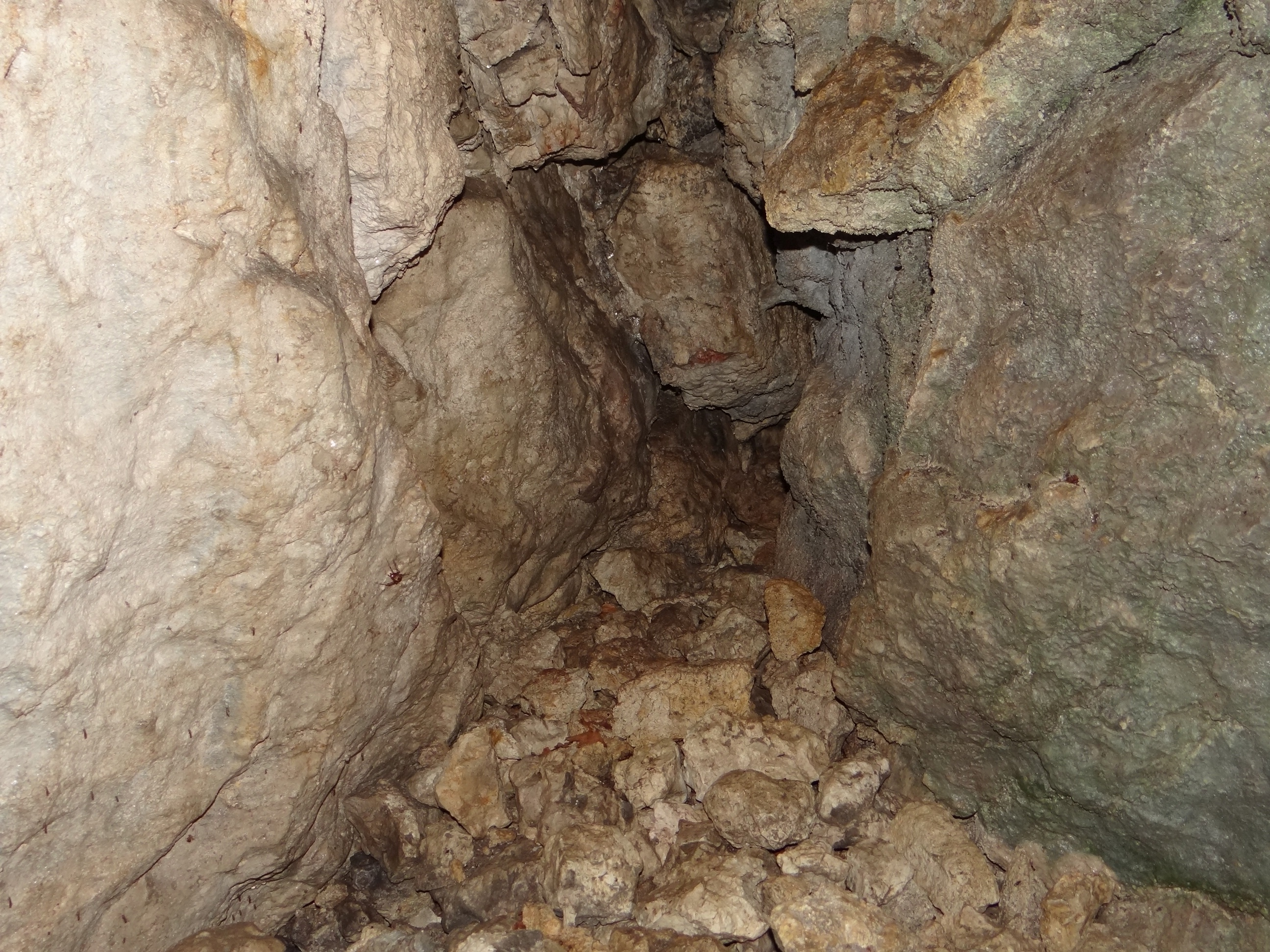 Korytarz w Krętych Skałach w Dolinie Szklarki